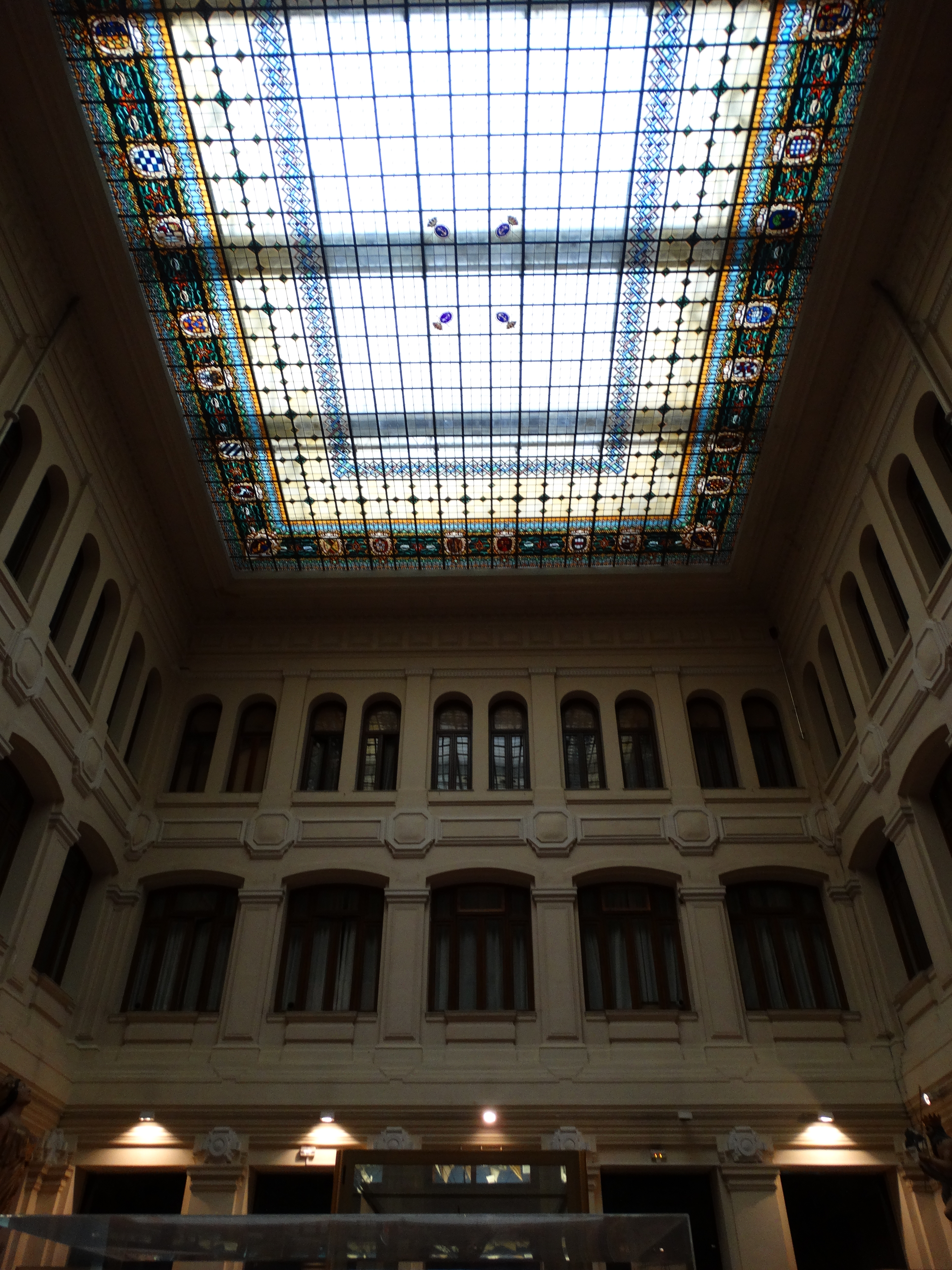 Museo Naval de Madrid, España. Vidrieras del techo de uno de los patios.